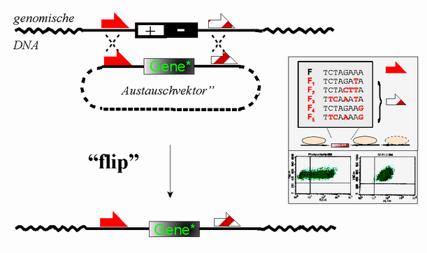 selbstgefertigte Darstellung des RMCE Verfahrens (JBO 2003)